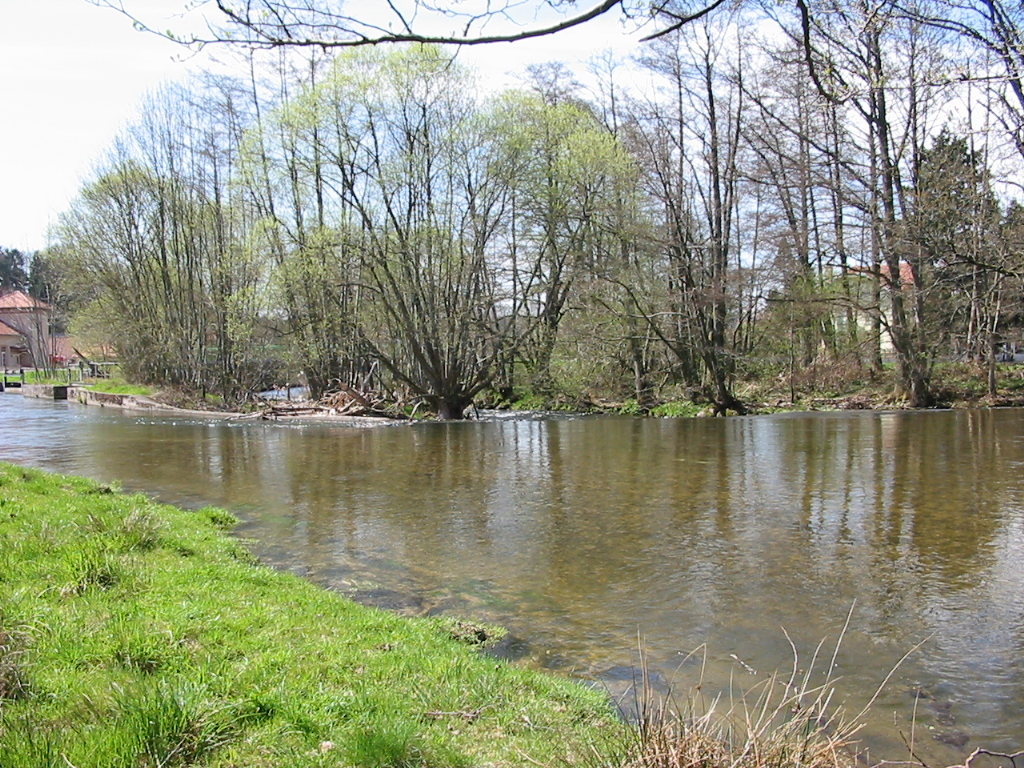 La Vologne à Beauménil (commune des Vosges)